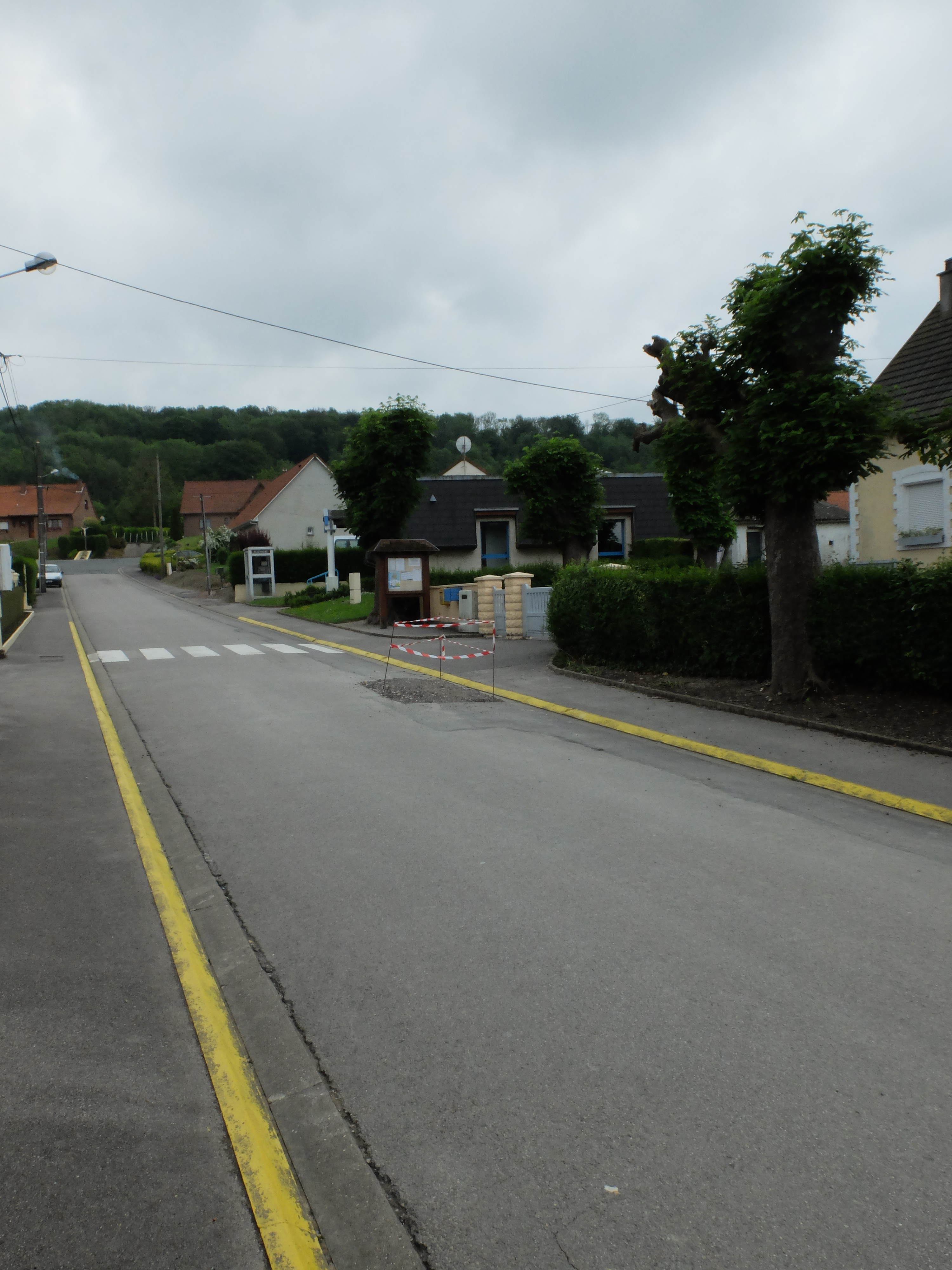 Vue de la rue de l'église de Saint-Martin-Choquel.